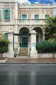 תמונה של בית המחסה אתנחתא בירושלים